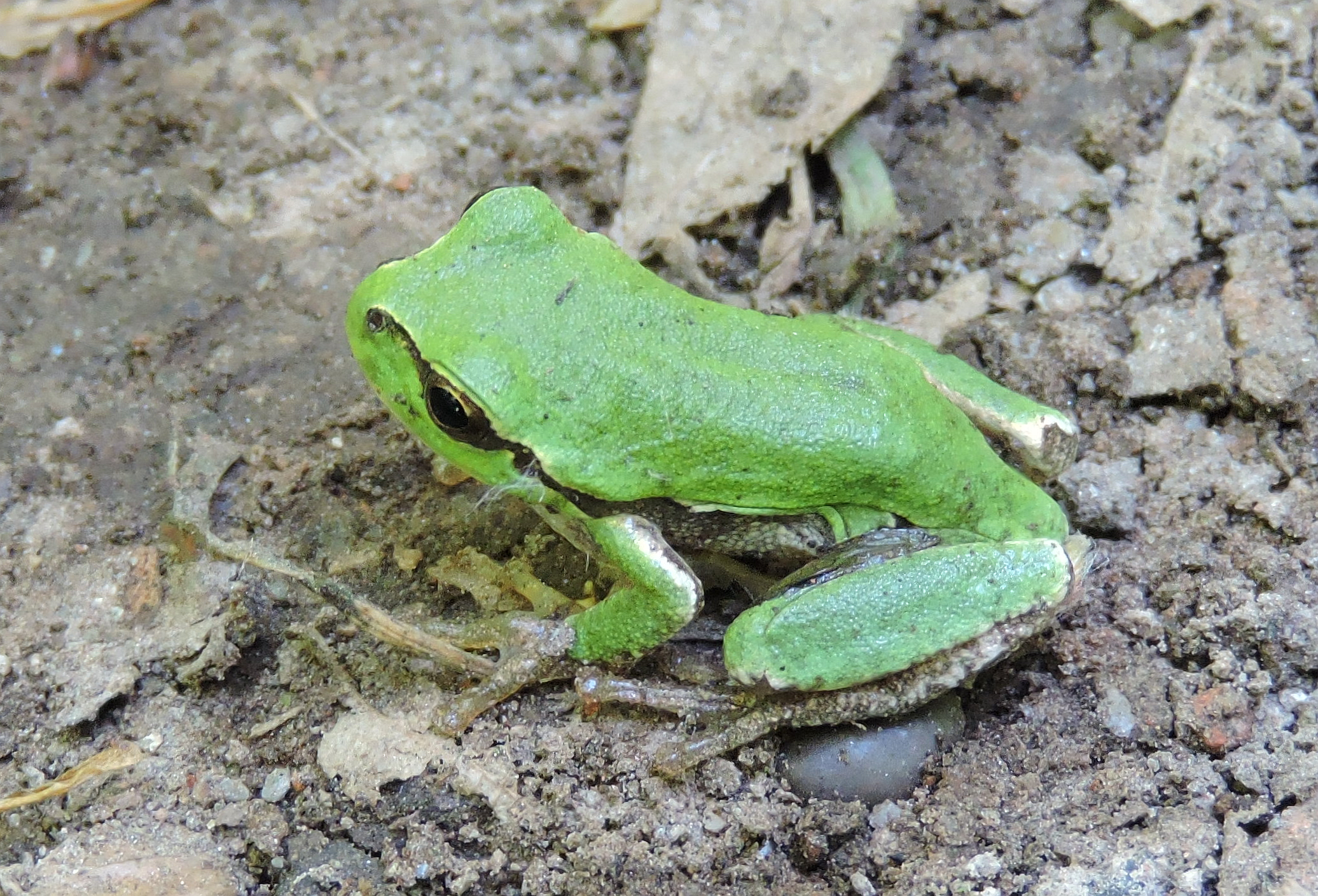 parco naturale del Bosco delle Sorti della Partecipanza di Trino (Q3895638)